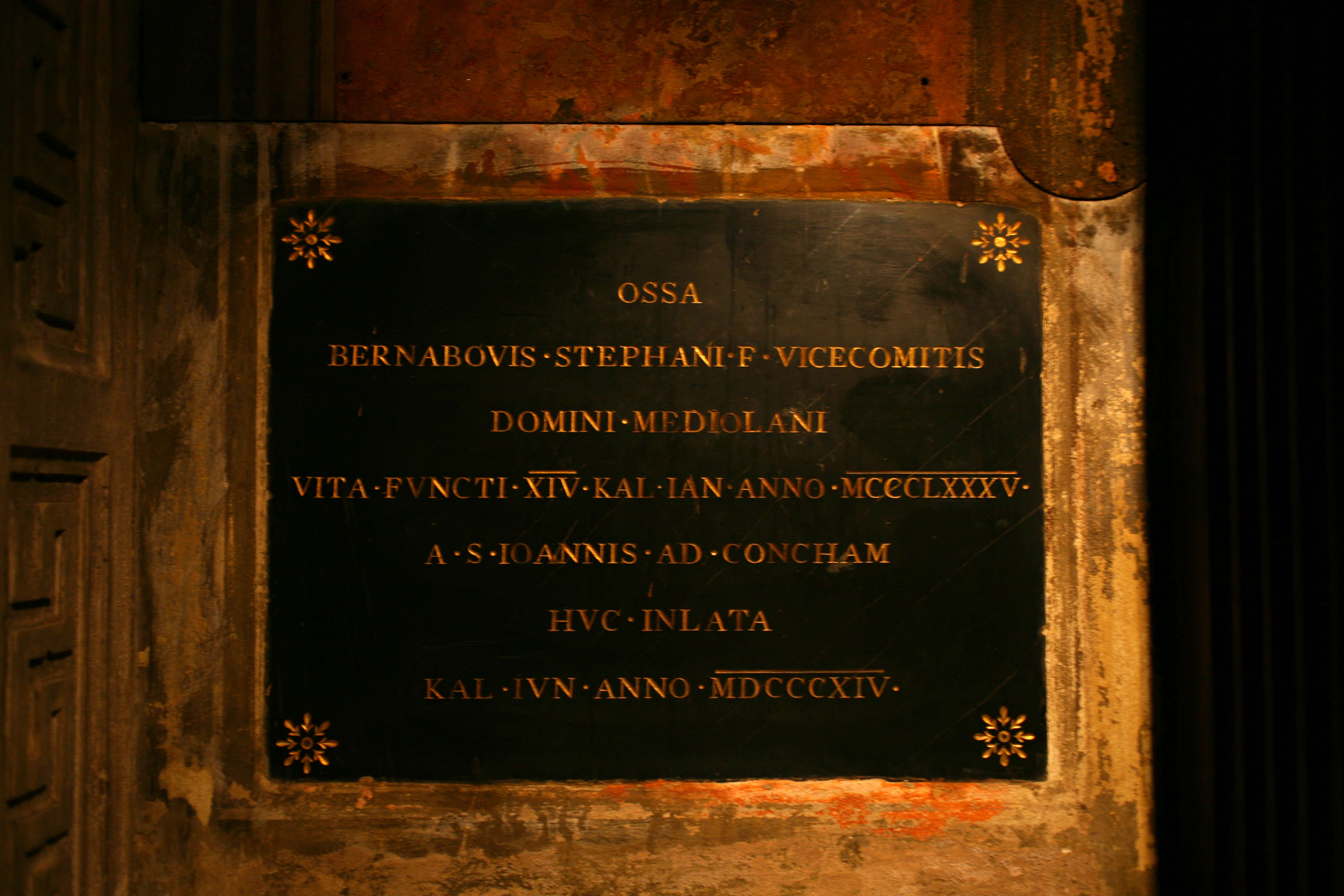 Sepoltura di Bernabò Visconti (1323-1385), marito di Regina della Scala, chiesa di Sant'Alessandro a Milano